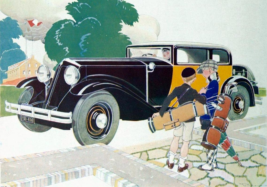 Publicité Renault unitaire d'Octobre 1930, pour sa gamme Stella.